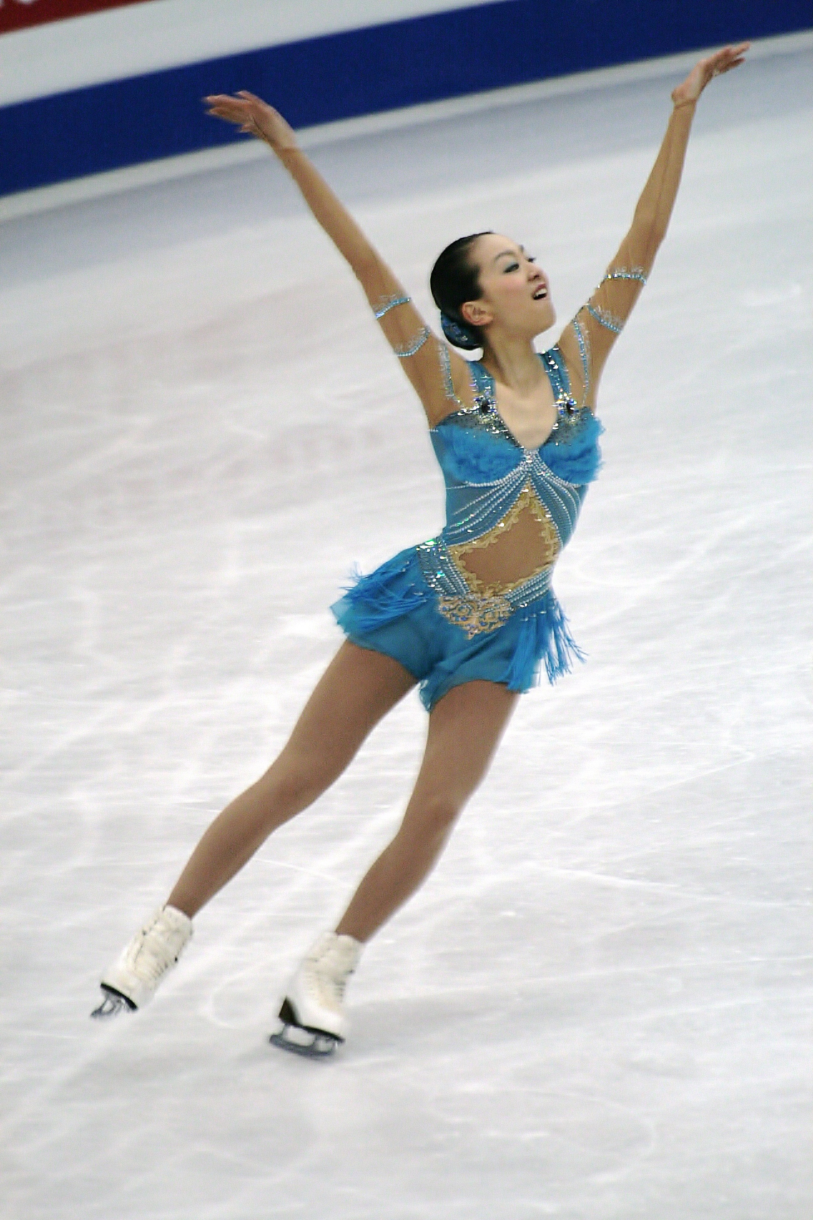 Мао Асада (Япония) на чемпионате мира по фигурному катанию 2012